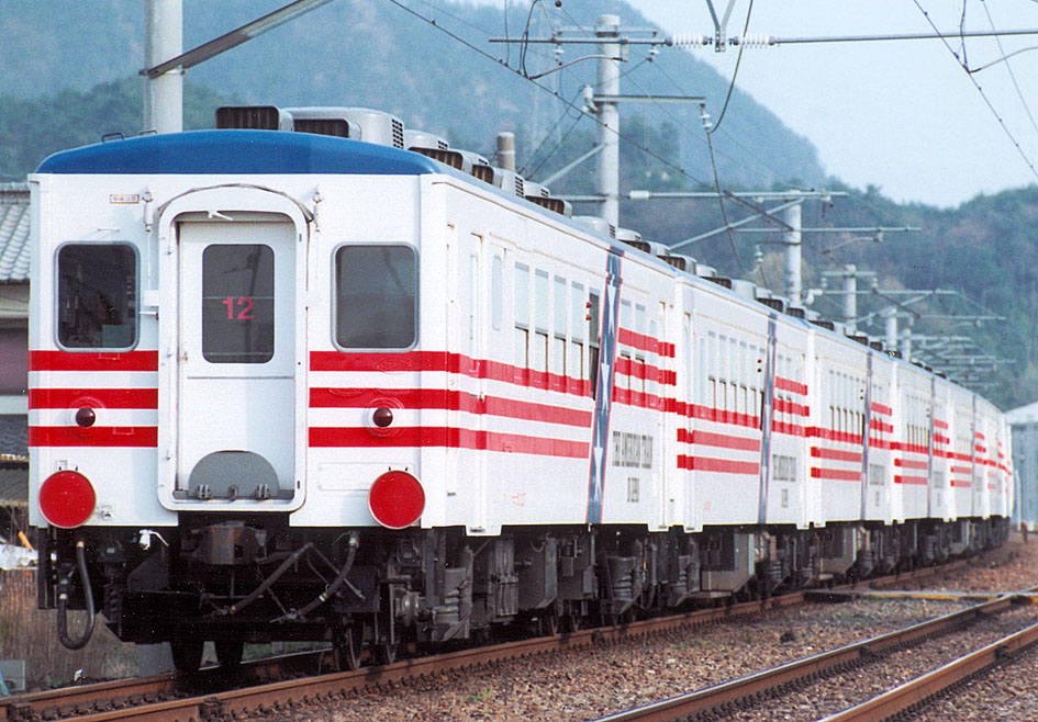 アメリカントレイン